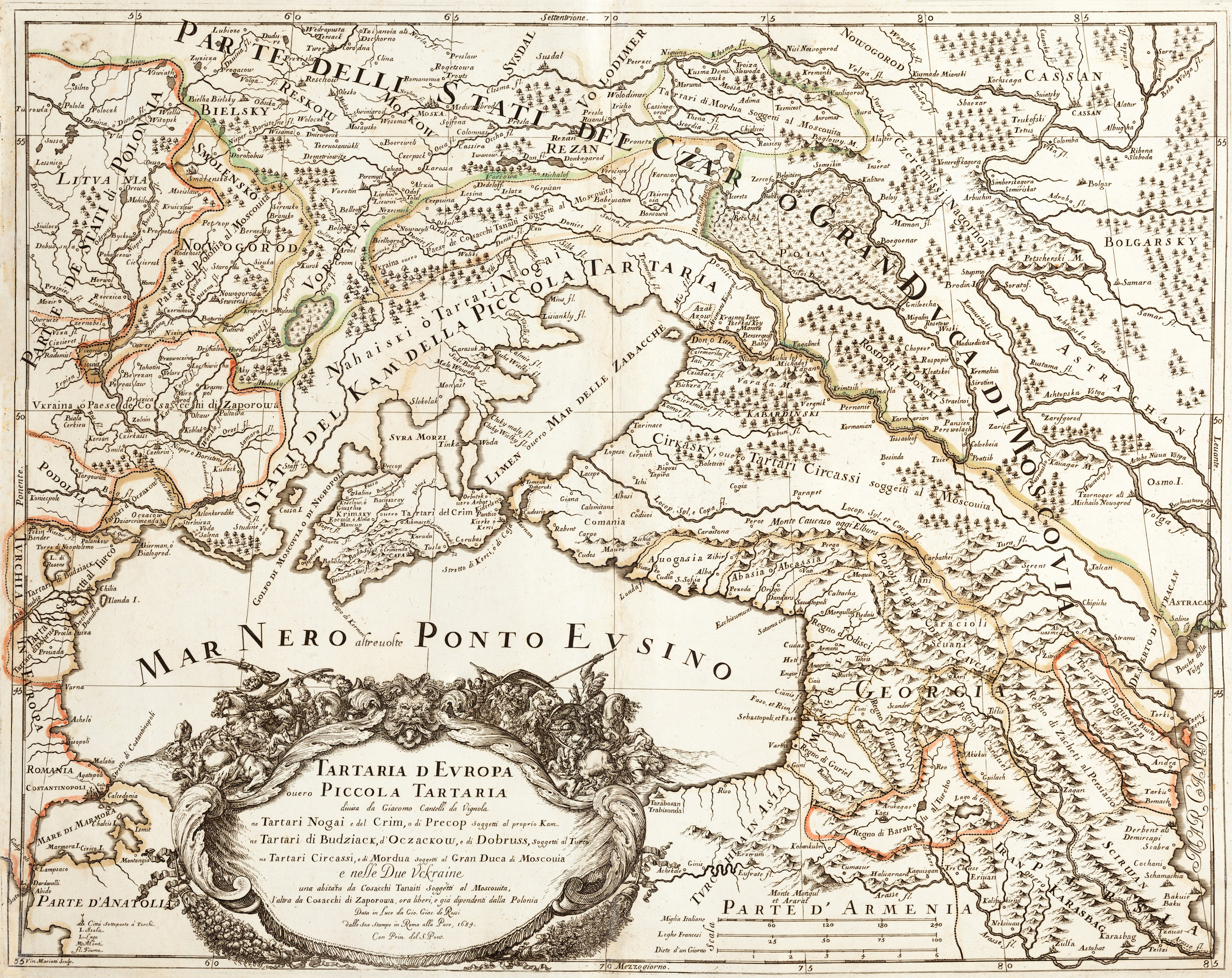 Tartaria D Europa ouro Piccola Tartaria divisa da Giacomo Cantelli da Vignola ne Tartari Nogai, Giacomo Cantelli da Vignola/Giacomo Giovanni Rossi (Rome, 1684) Представлено оригінал венеційського 1684 р. відомого італійського видавця Джакомо Джованні Россі, який опублікував карту Європейської та Малої Татарії. На карті позначені дві «козацькі України». Центральна Україна позначена, як «Україна, земля запорозьких козаків». На північному сході українських земель позначена «Україна, земля козаків, що підпорядковується Московії».